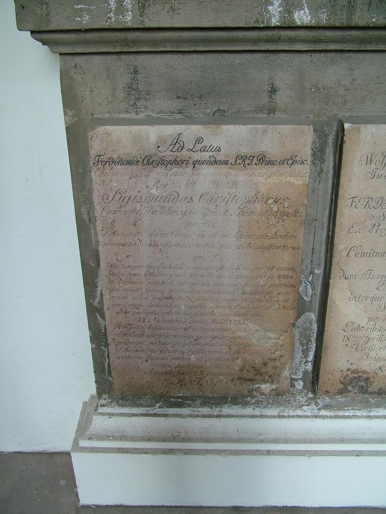 Grabstätte Zeil-Trauchburg im Mausoleum des Erzbischofs Wolf Dietrich von Raitenau auf dem Salzburger Sebastiansfriedhof bestattet.